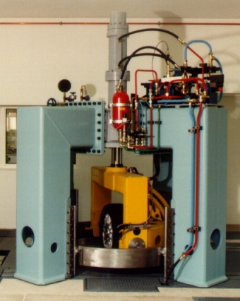 Reifenprüfstand der Universität Dresden